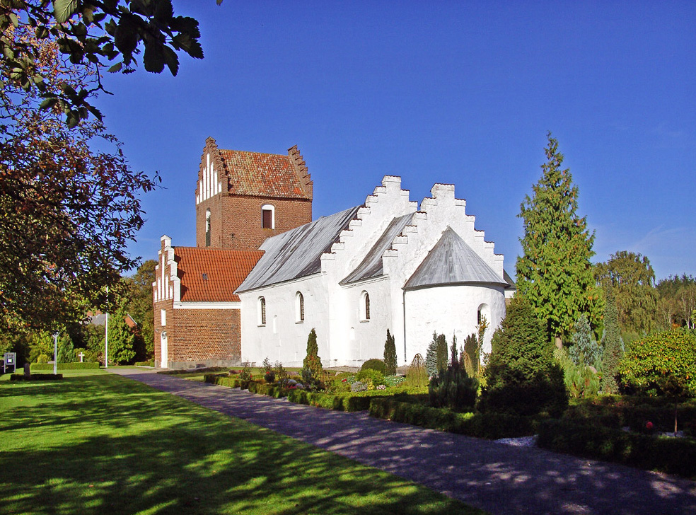 fra sydøst